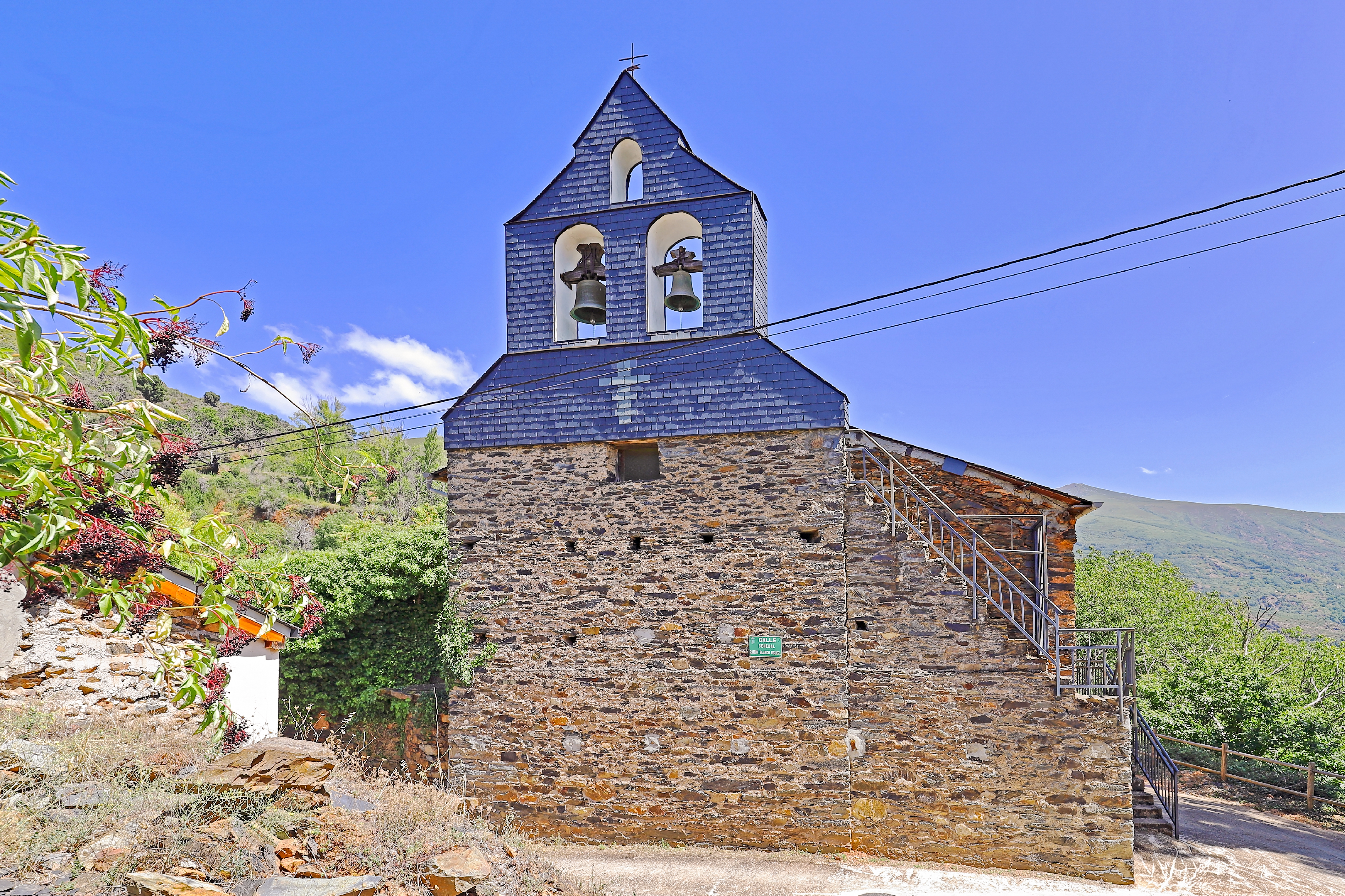 Santalavilla es una localidad que pertenece al municipio de Benuza, comarca de El Bierzo, provincia de León.